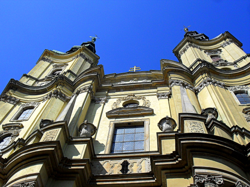 Legnica, ul. Partyzantów 25 - kościół parafialny św. Jana Chrzciciela